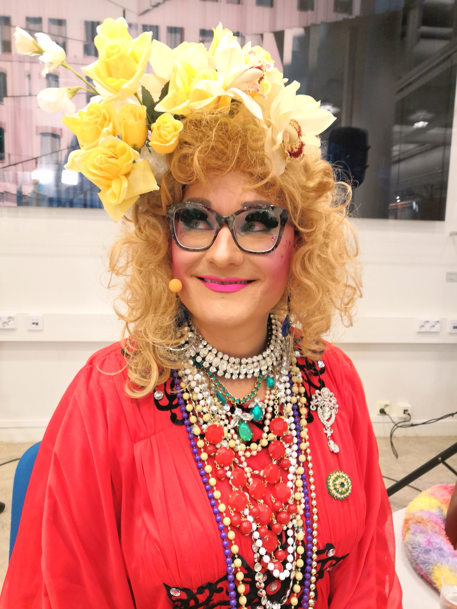 Suomalainen drag taiteilija Maimu Brushwood